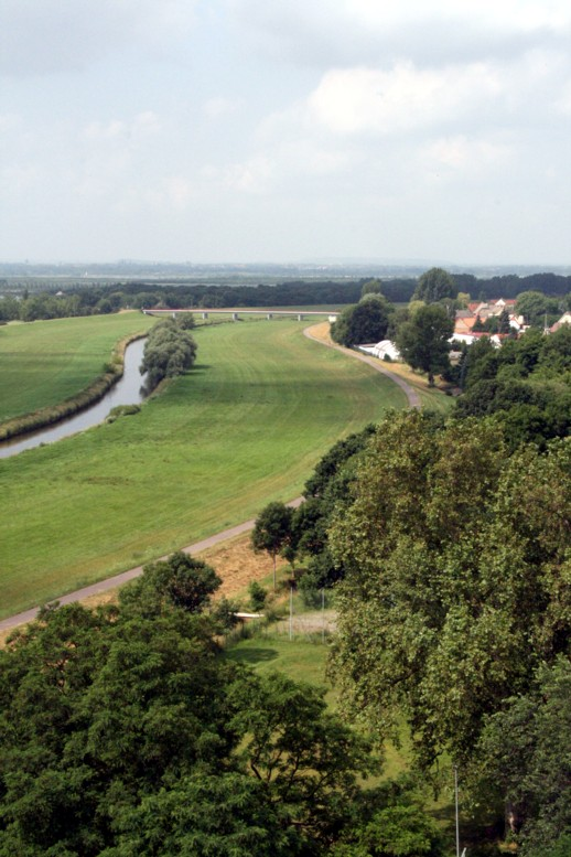 Raßnitz, vom Kirchturm nach Westen gesehen mit Fluss Weiße Elster, rechts Elster-Radweg